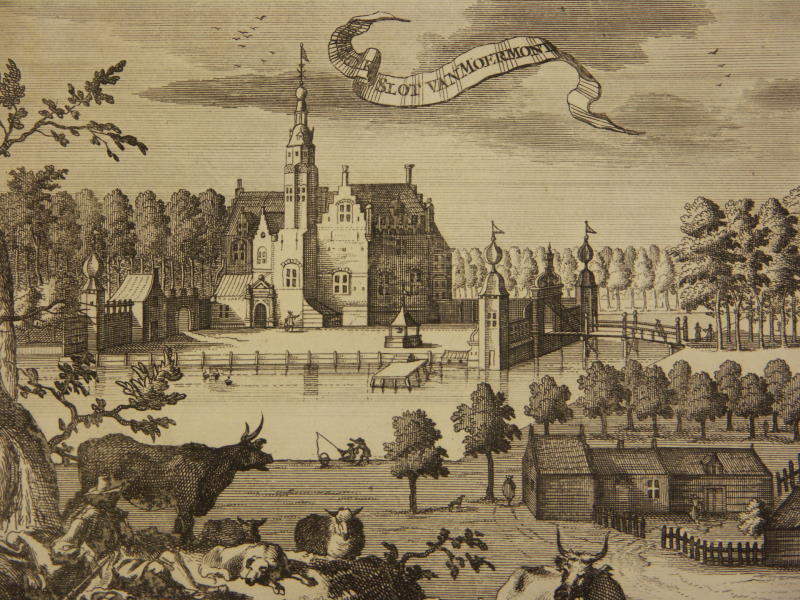 Kupferstich: Schloss Moermond in Zeeland